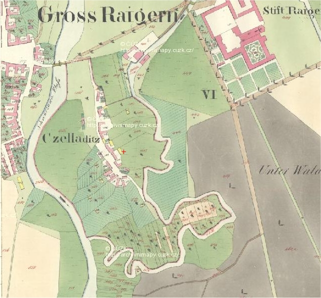 Čeladice na mapě povinných císařských otisků.